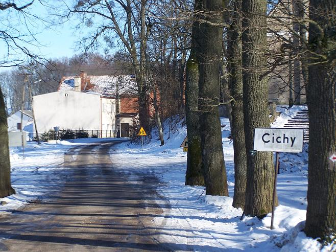 wjazd do cichego